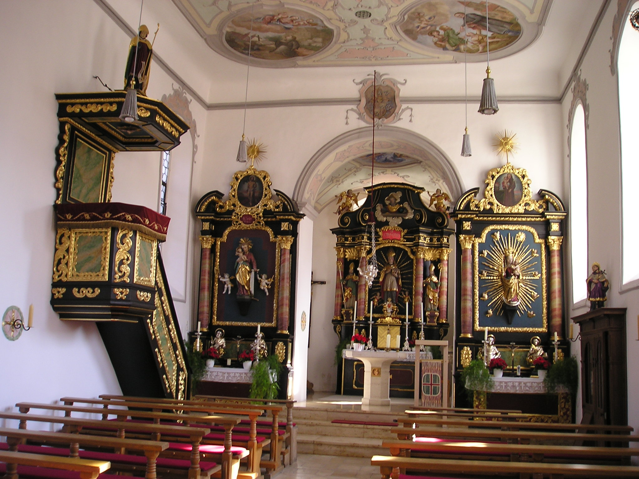 Enkering im Anlautertal, Barockausstattung der Pfarrkirche St. Otmar